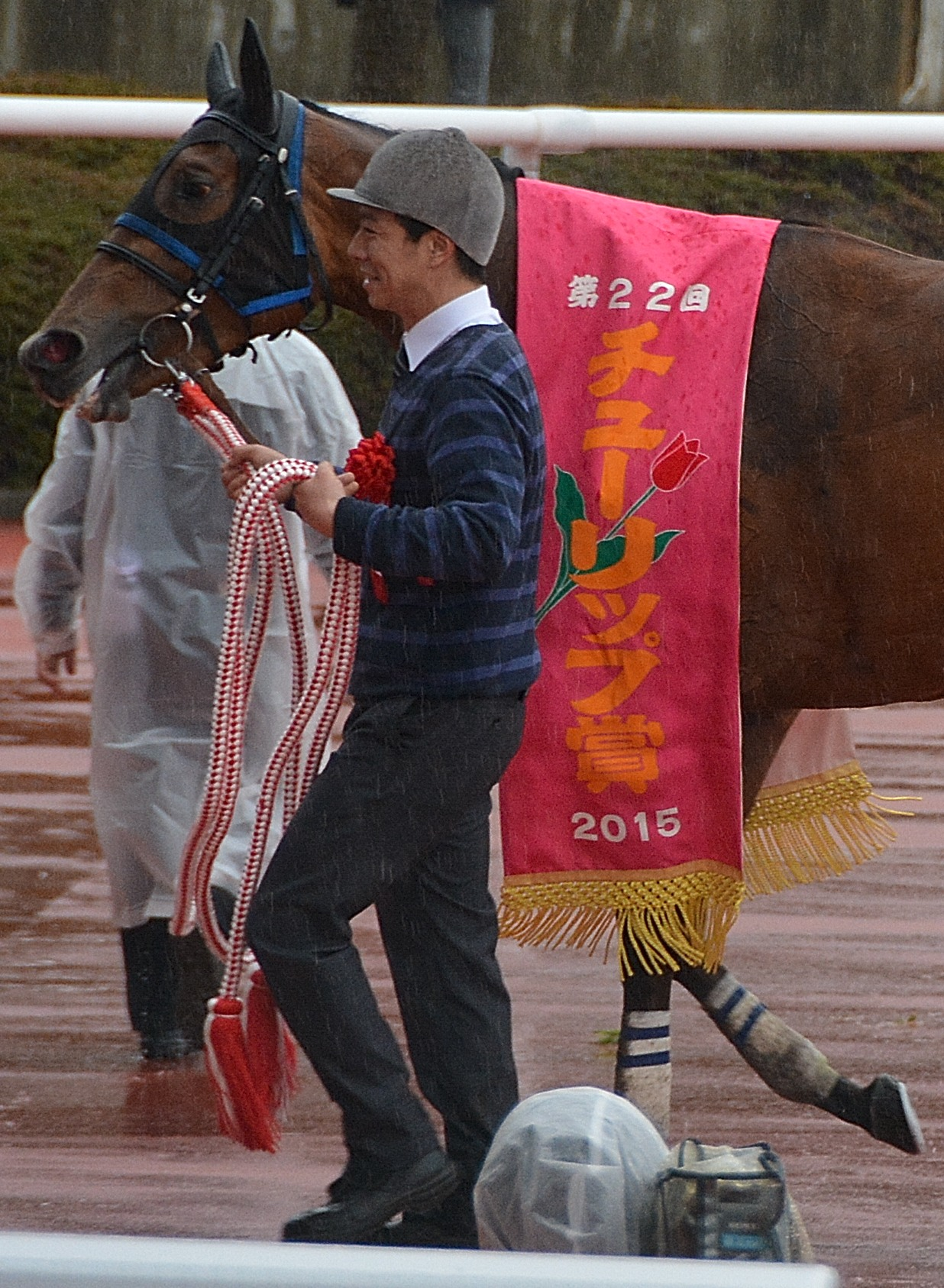 阪神競馬場で2015年3月7日に、第11競走の「第22回チューリップ賞 (GIII)」が終わった後に勝利馬が優勝レイを装着しているところを、観客席から撮影したもの。装着馬は14番のココロノアイ号。